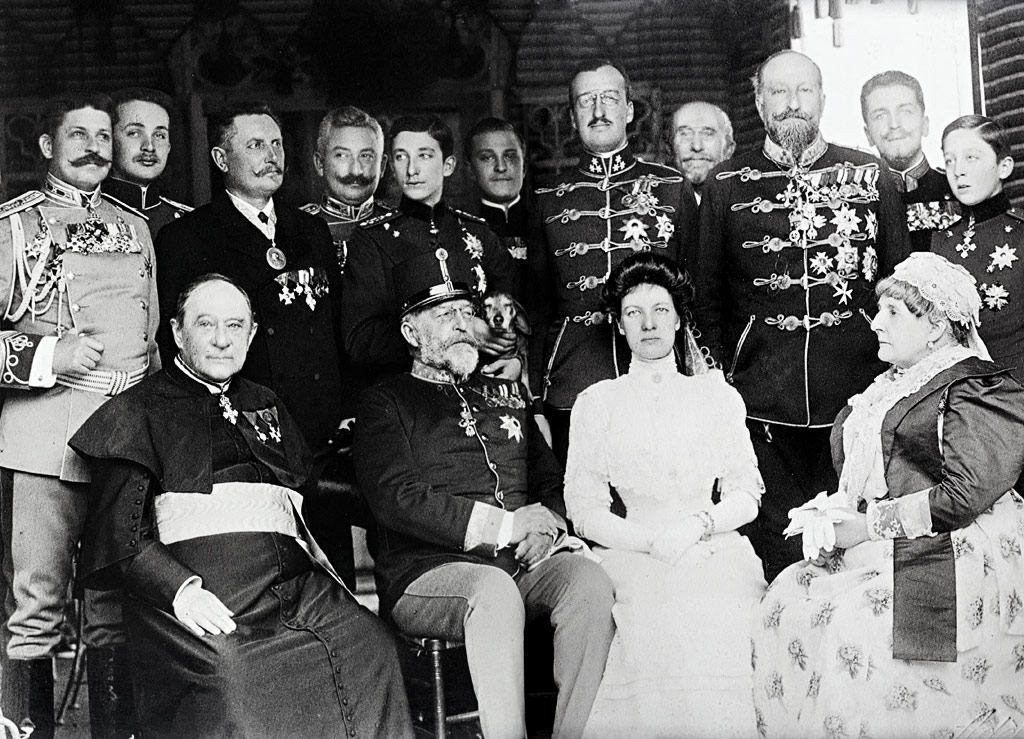 Н.В.Цар Фердинанд I, Князете Борис и Кирил с роднини в Ебентал, Австрия. Седнал, с униформа е по-големият брат на Царя Принц Филип фон Сакс Кобург-Гота (1844-1921), най-отдясно сестра им Клотилде (1846-1927) Ерцехерцогиня фон Остерайх (Erzherzogin von Österreich), 1912 г.